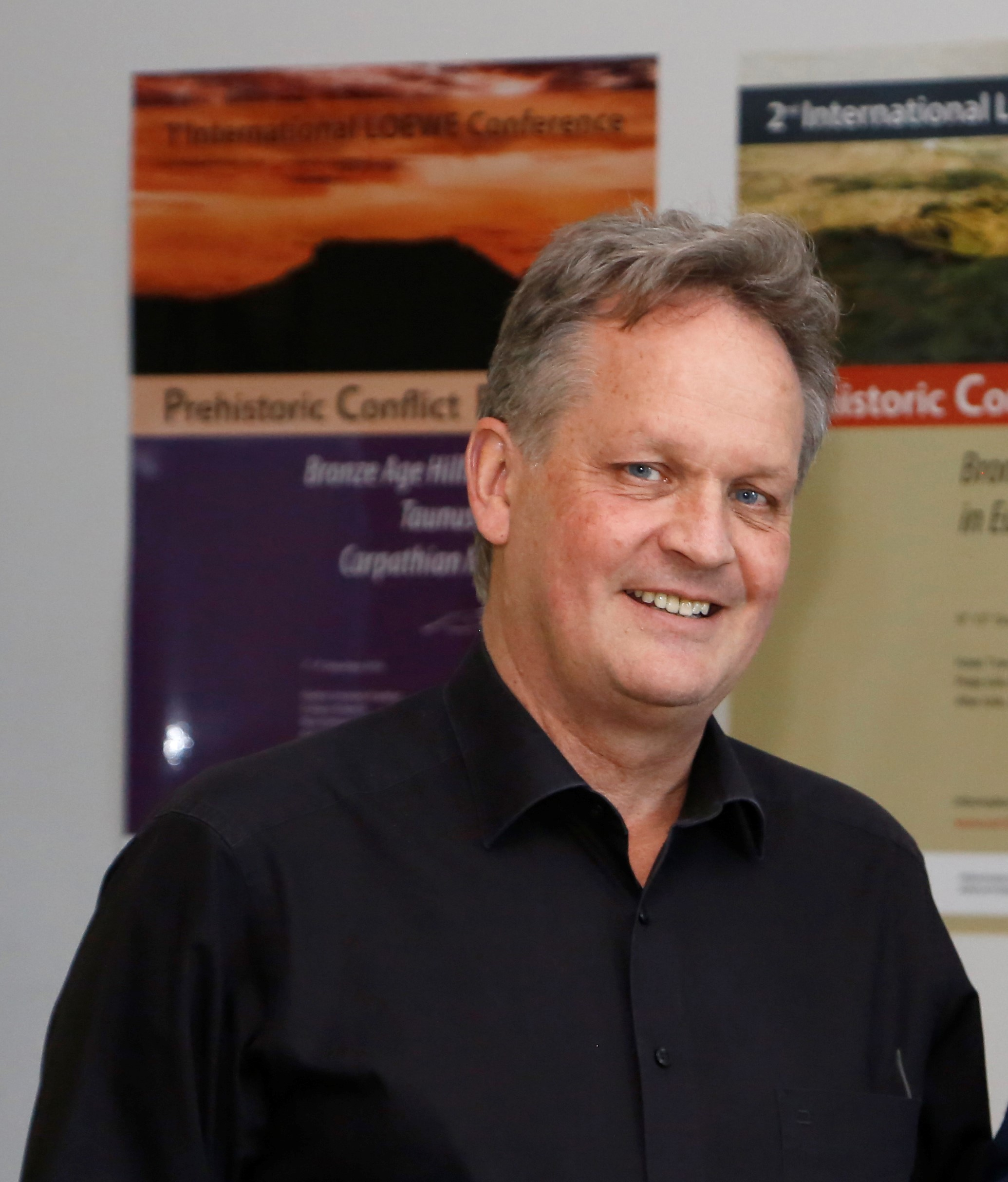 Porträt des Archäologen Rüdiger Krause, aufgenommen in der Universität Frankfurt